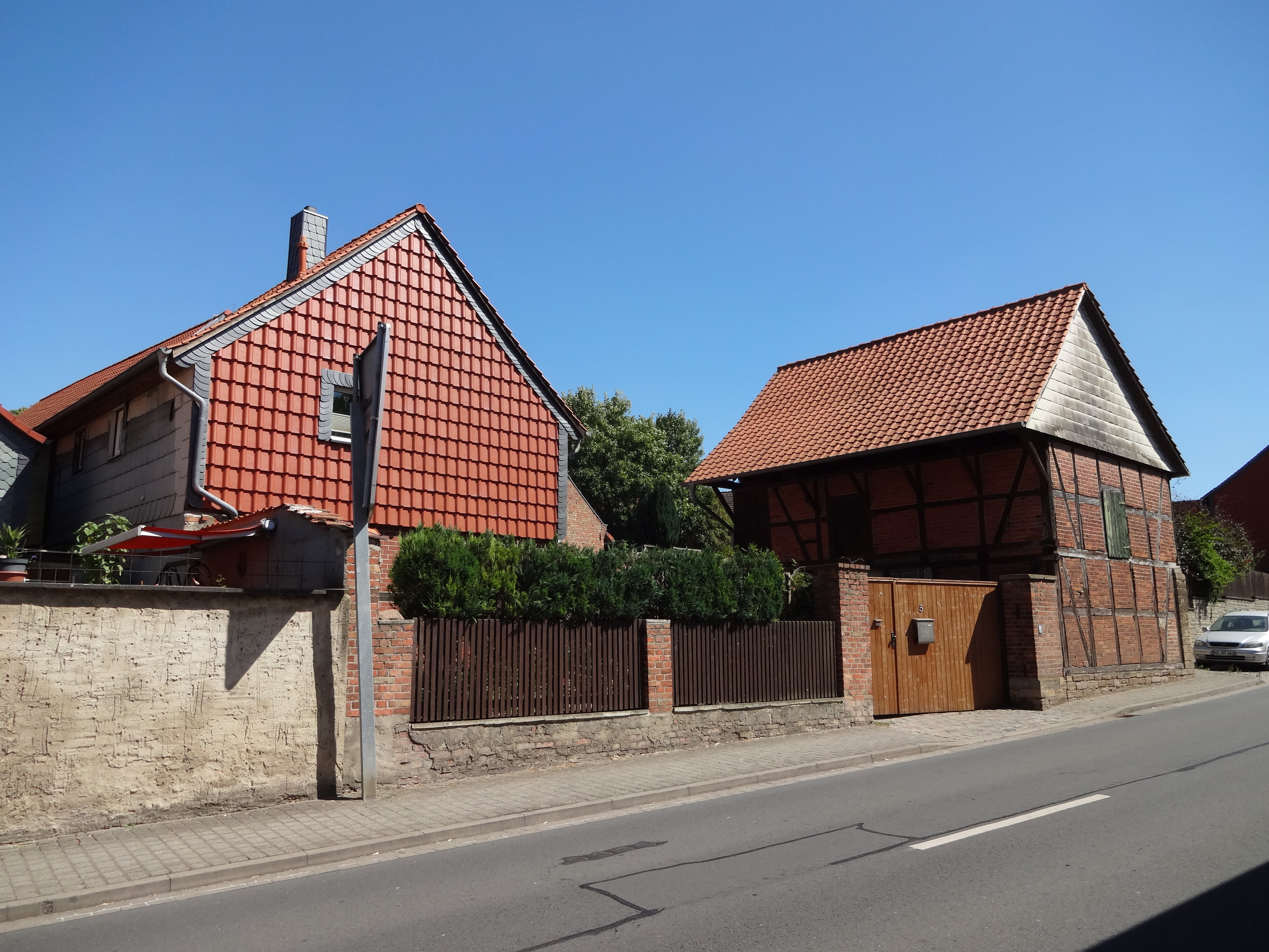 denkmalgechützter Bauernhof in der Ernst-Thälmann-Straße 5 in Dedeleben